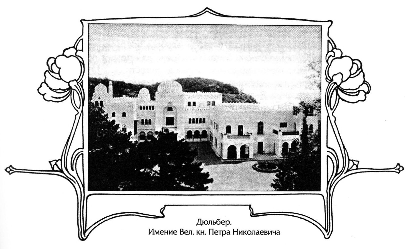 Дюльбер. Имение Вел. кн. Петра Николаевича